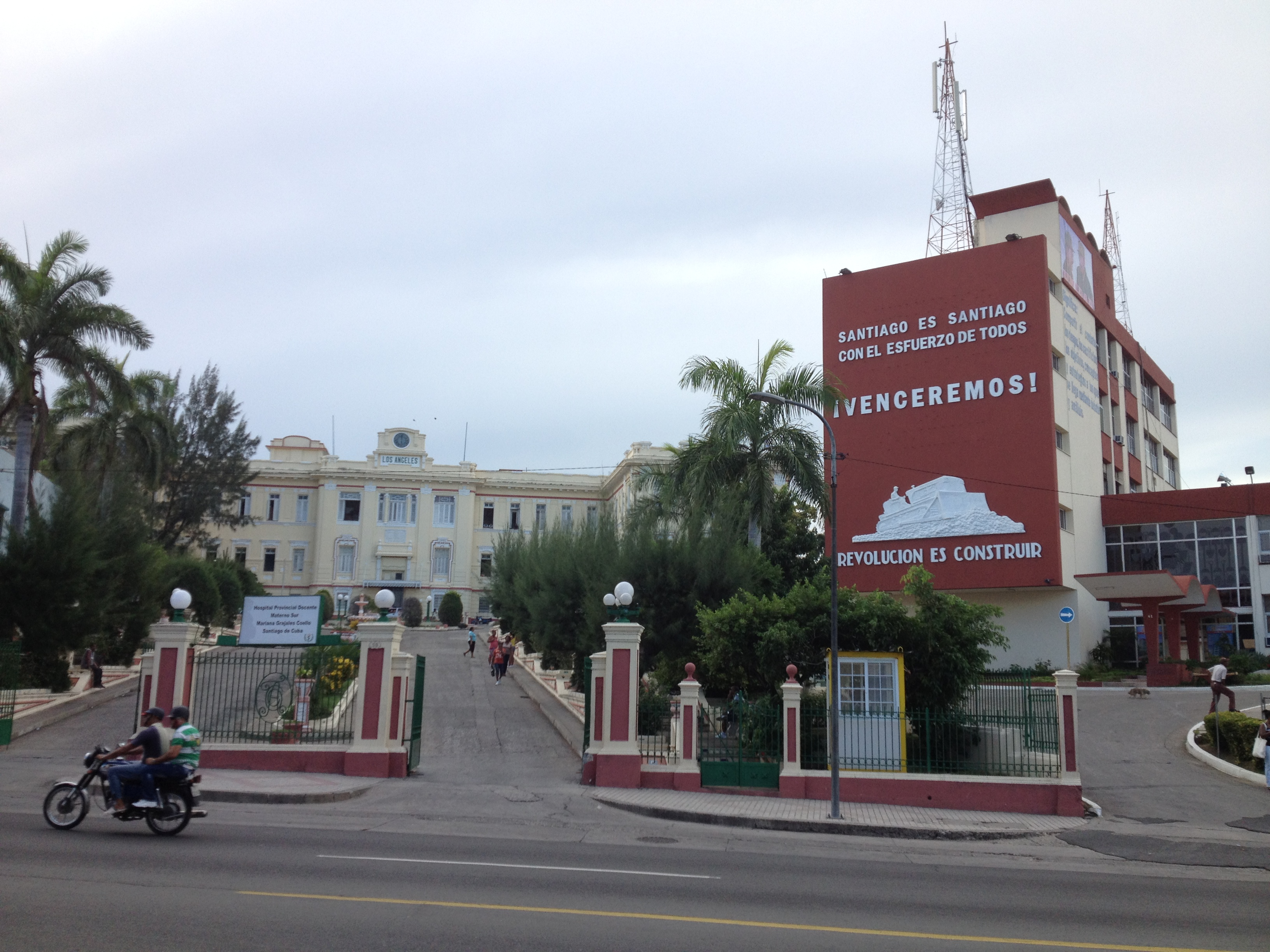 Hospital Materno (früher Hospital Los Angeles) in Santiago de Cuba